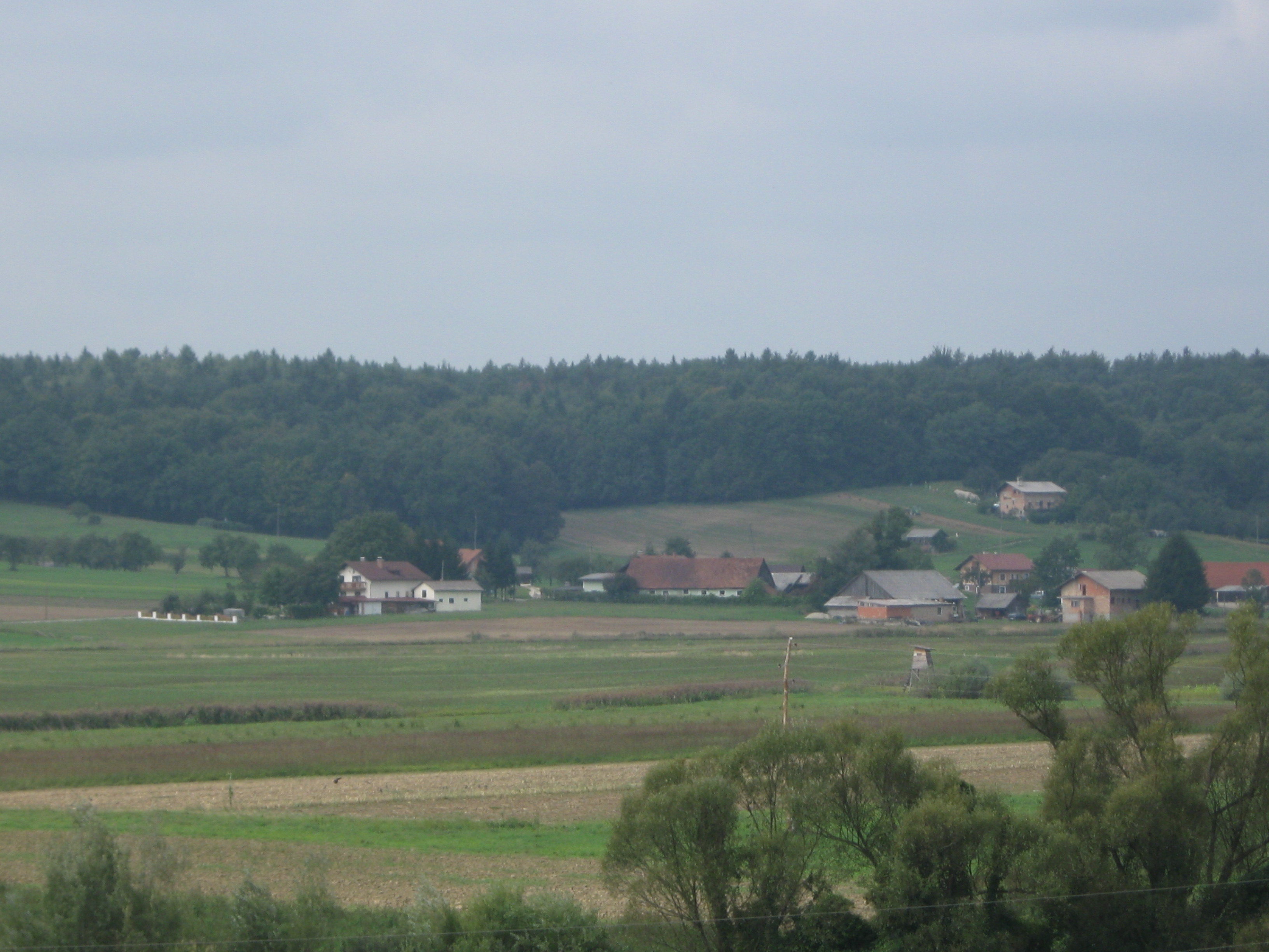 Pogled na del Verjan iz Brengove